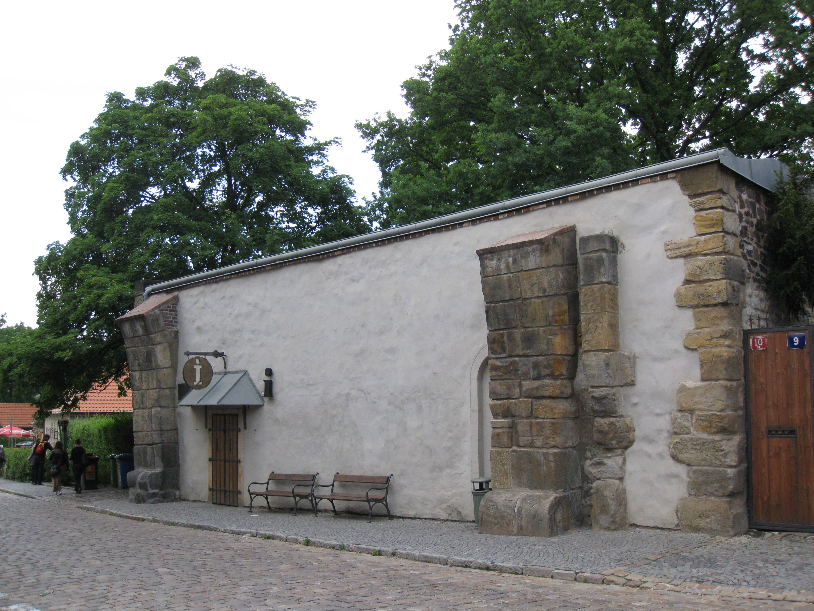 Pevnost Vyšehrad, Praha 2-Vyšehrad, Soběslavova 14/1, V pevnosti 16/2, 35/11, K rotundě 16/3, 81/6, 82/8, 90/12, 91/14, 92/16, 100/10, Štulcova 89/1, 102/2, 69/3